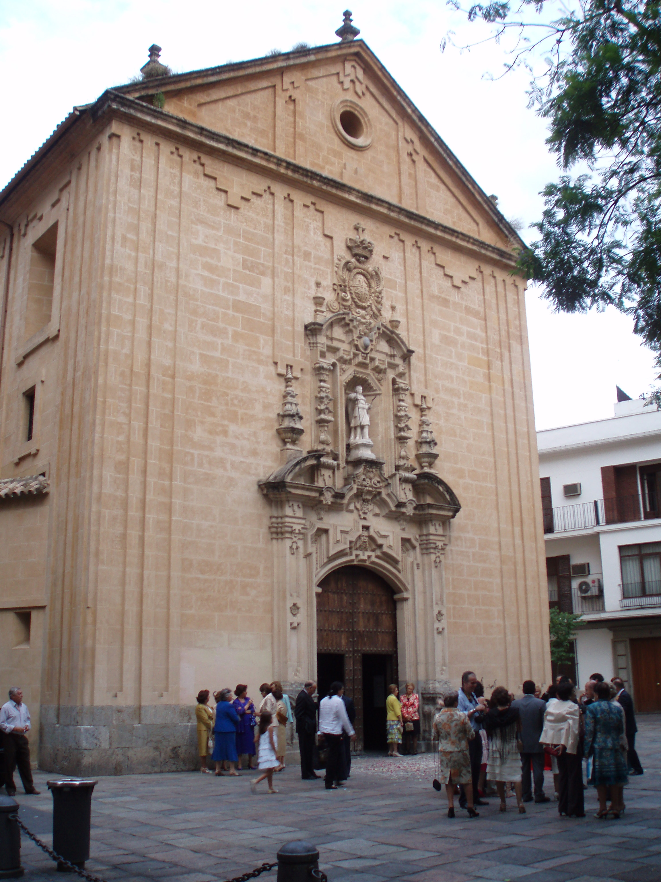 Fachada principal de la iglesia de San Hipólito de Córdoba, provincia de Córdoba, (España).